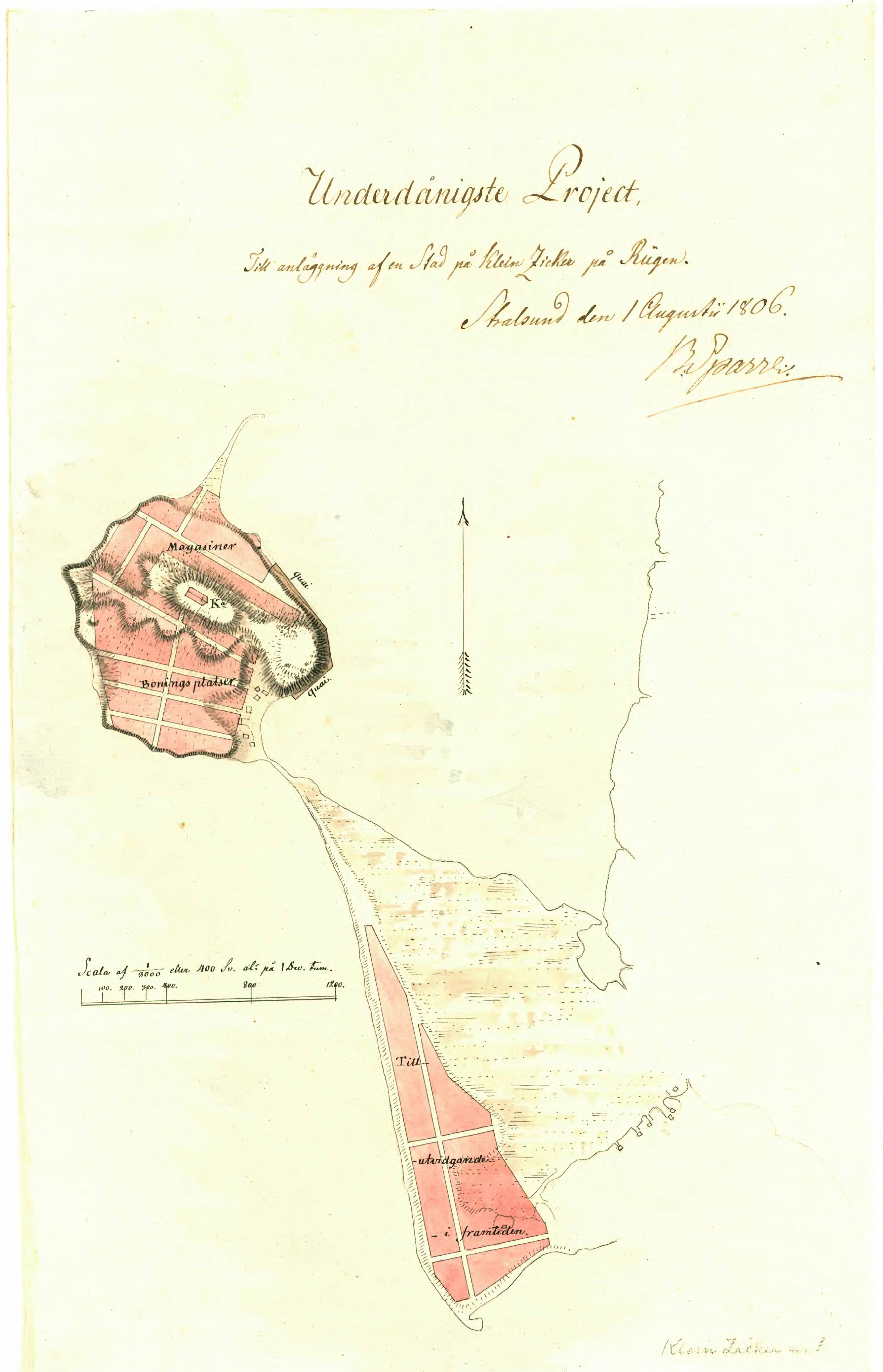 Karte von Klein Zicker und dem Thiessower Haken aus dem Jahr 1806. Der schwedische Oberstleutnant Baron Sparre wertete im Juli/August 1806 vorausgegangene Vermessungsarbeiten zur Planung einer Hafenstadt auf Rügens Halbinsel Mönchgut aus und fügte diese Karte seinem Bericht an die schwedische Krone bei. Beschriftung: „Underdänigste Project. Till anläggning af en Stad på Klein Zicker på Rügen. Stralsund den 1 Augusti 1806. B.Sparre.“ (deutsch: Untertänigstes Projekt zur Anlage einer Stadt auf Klein Zicker auf Rügen. Stralsund, den 1. August 1806) Nördlich einer auf der mit 38 m ü. NN höchsten Erhebung von Klein Zicker zu erbauenden Kirche sollten Lagerhäuser entstehen und südlich davon die Wohnquartiere. Am östlichen Ufer, um die bereits im Großen Nordischen Krieg (1700–1721) errichteten Schanze, sollten die ersten Schiffsanlegeplätze entstehen. Weiter südlich war der Thiessower Hacken für zukünftige Erweiterungen vorgesehen.